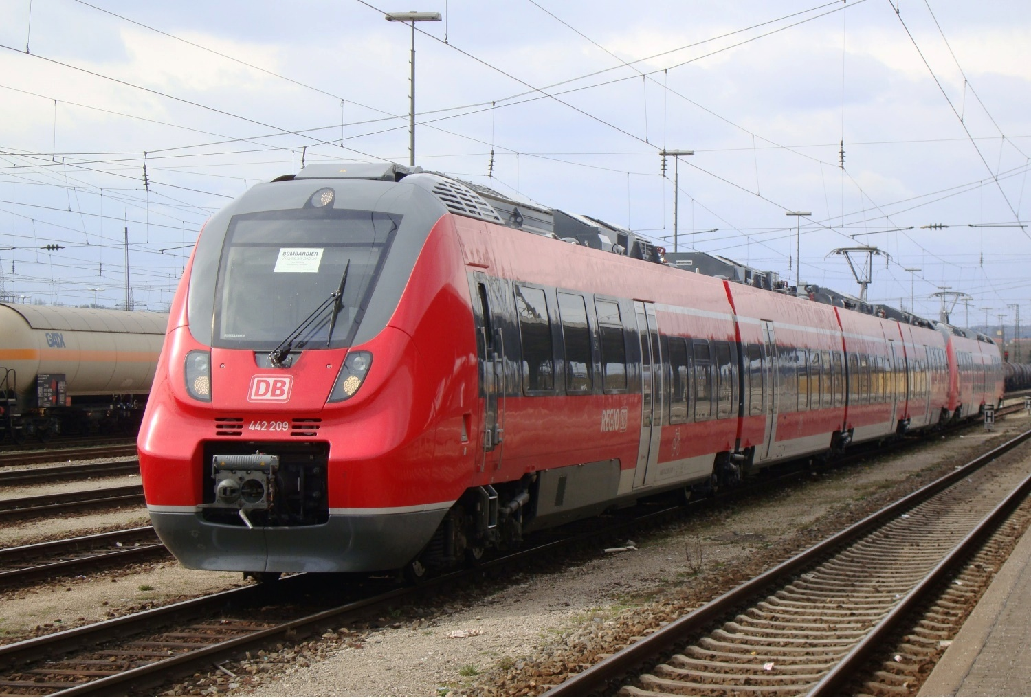 Talent 2-Triebwagen der Deutschen Bahn (DB) im Bahnhof Donauwörth. Vorne der Vierteiler 442 209, hinten der Zweiteiler 442 006. Die beiden Triebwagen waren als Testfahrt unterwegs.